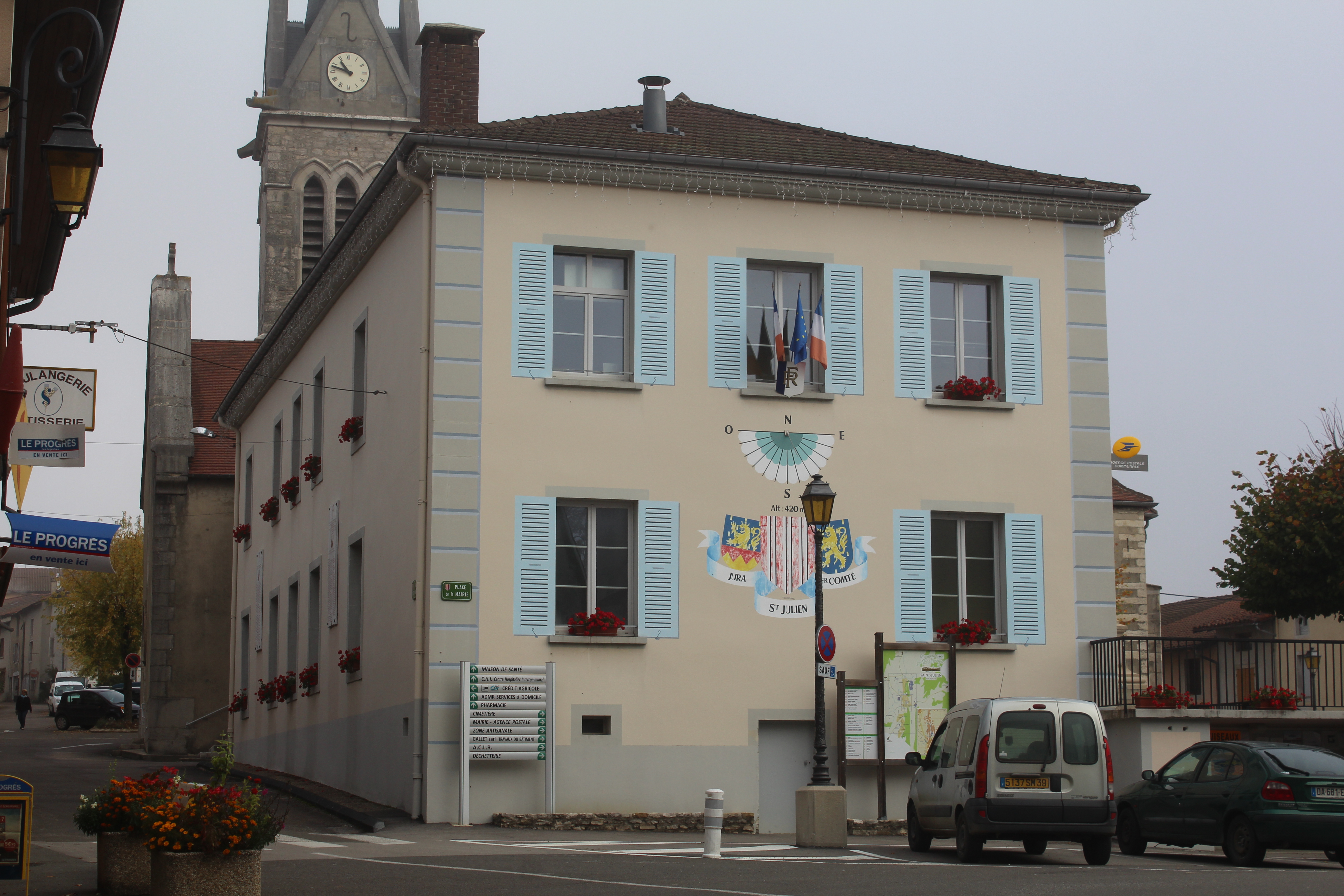 Mairie de Saint-Julien, Val-Suran.